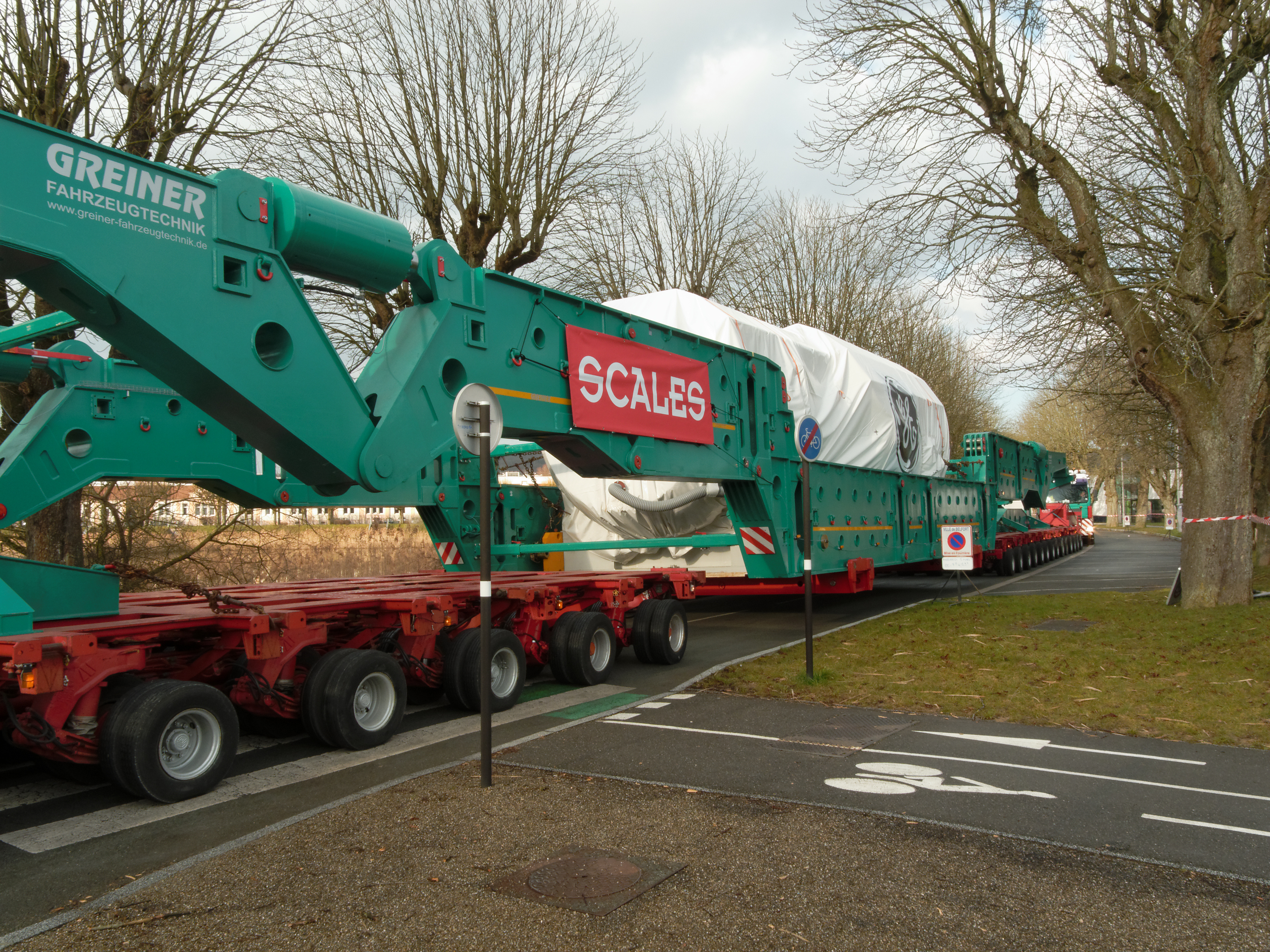 Sortie d'un convoi exceptionnel, à Belfort. Ce convoi est une turbine gaz fabriquée par General Electric. Le convoi fait 108 mètres de long et 819 tonnes (dont 390 tonnes pour la turbine) et 6,65 mètres de large.